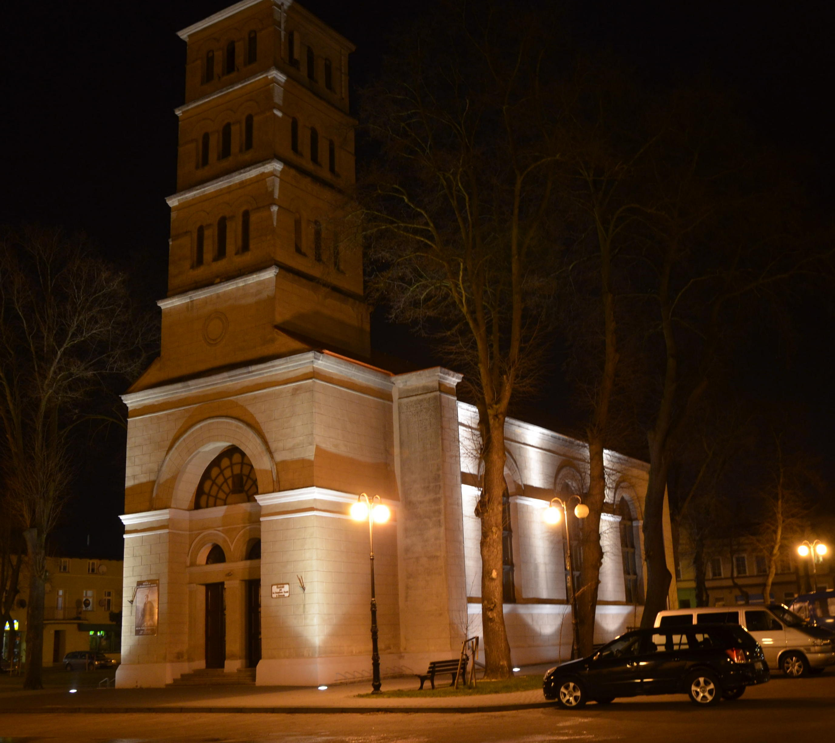 Złotów, kościół ewangelicki, ob. rzym.-kat. fil. p.w. św. Stanisława Kostki, 1829-1831